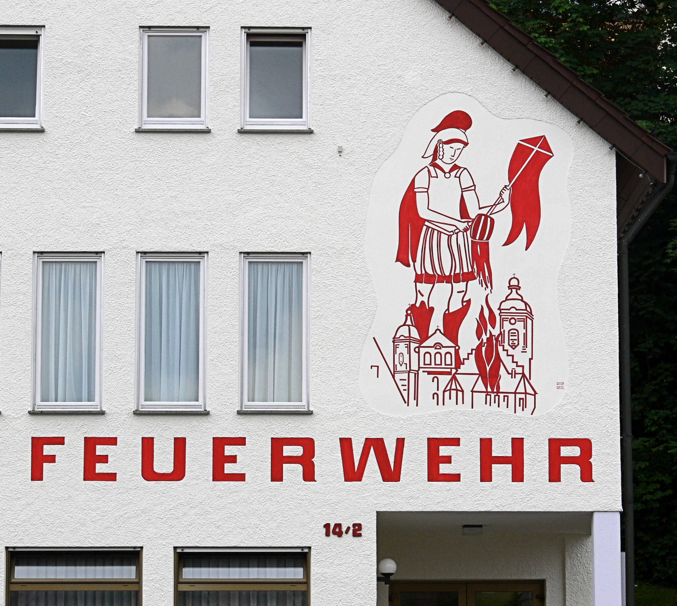 Weingarten (Württemberg), Feuerwehr mit Wandgemälde "St. Florian"